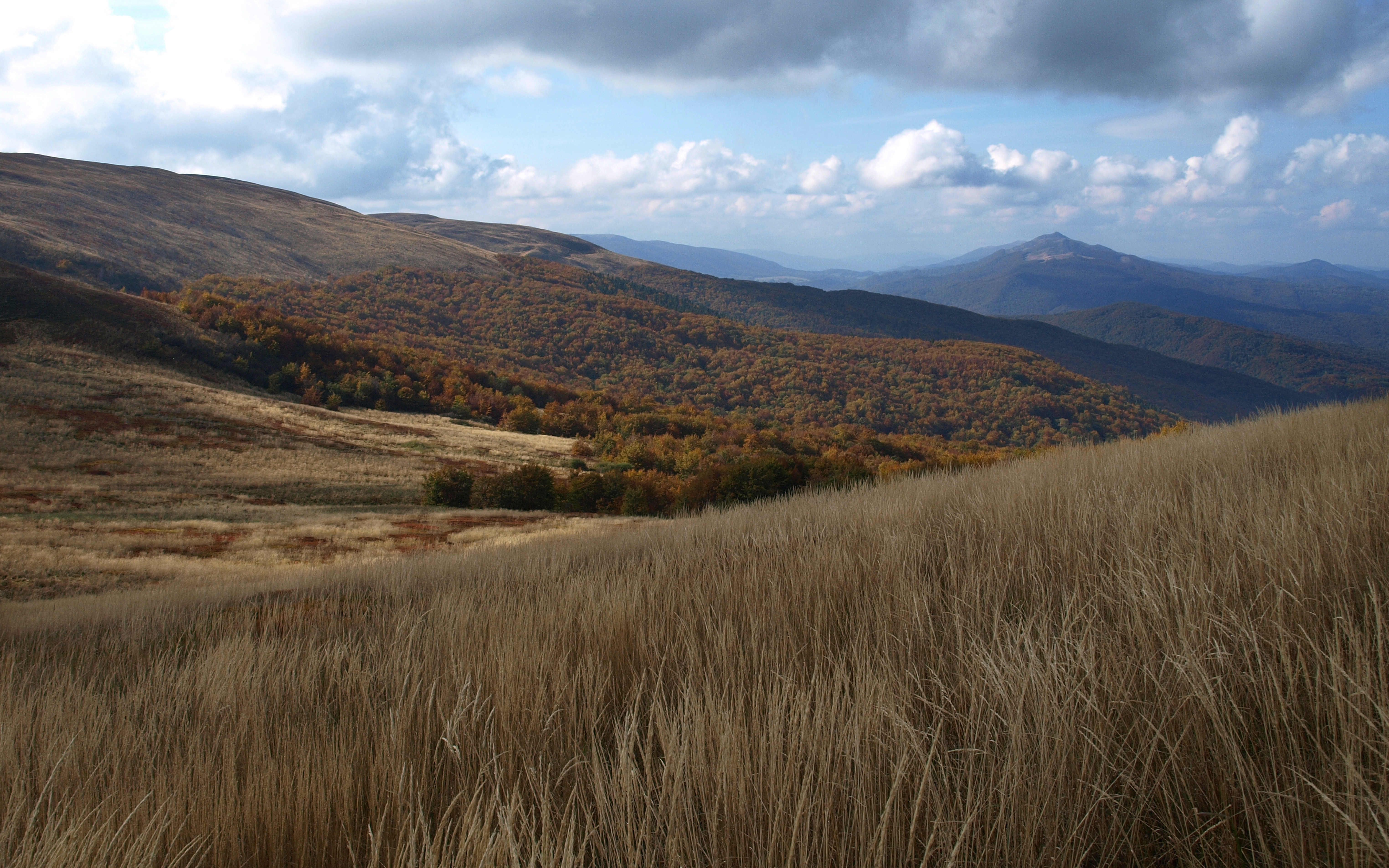 Specjalny obszar ochrony siedlisk Bieszczady. This is a photography of Natura 2000 protected area with ID PLC180001